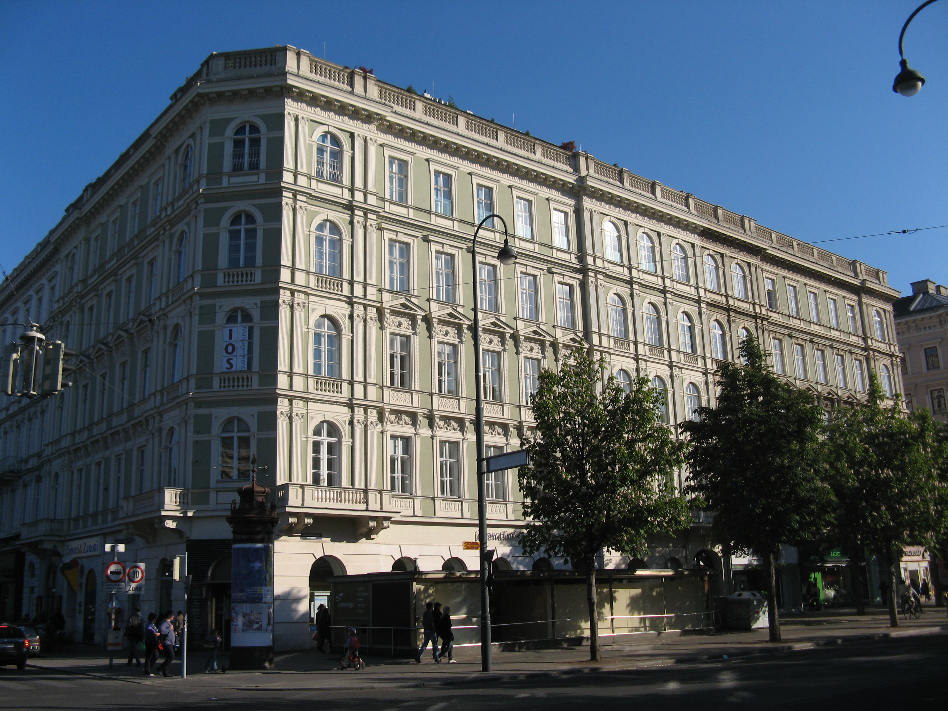 Wohnhaus (1862) von Johann Romano und August Schwendenwein, Babenbergerstraße 1, Wien-Innere Stadt